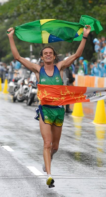 Frank Caldeira, Maratonista brasileiro / Brazilian marathon runner.